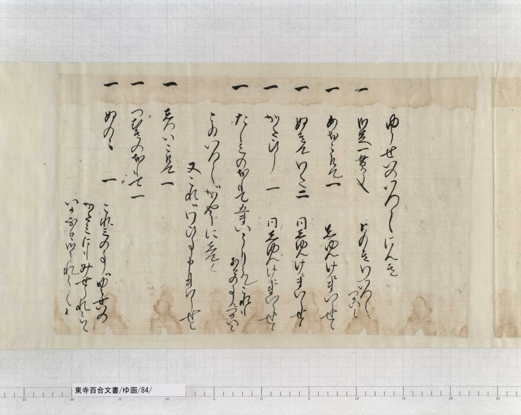 東寺百合文書ゆ函84文書名たまかき書状并備中国新見庄代官祐清遺文02